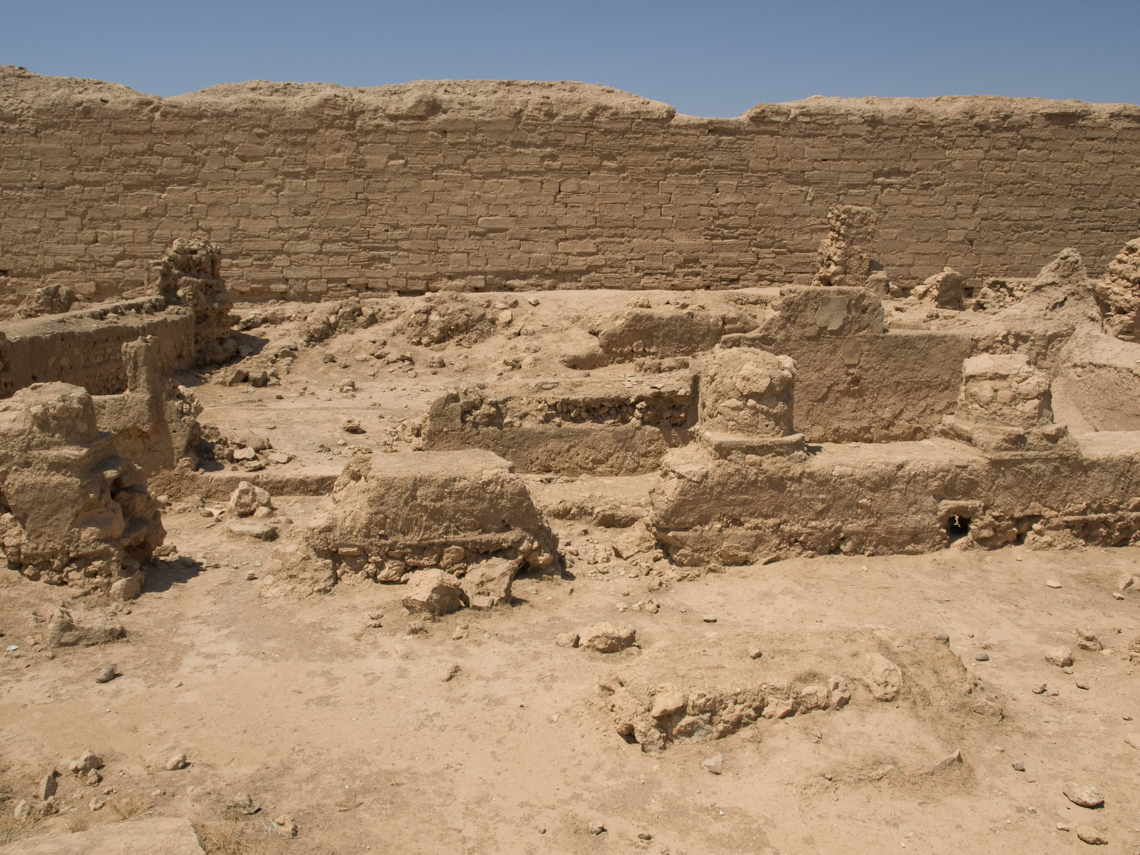 Cour, portique ouest et grande salle de la synagogue de Doura Europos.